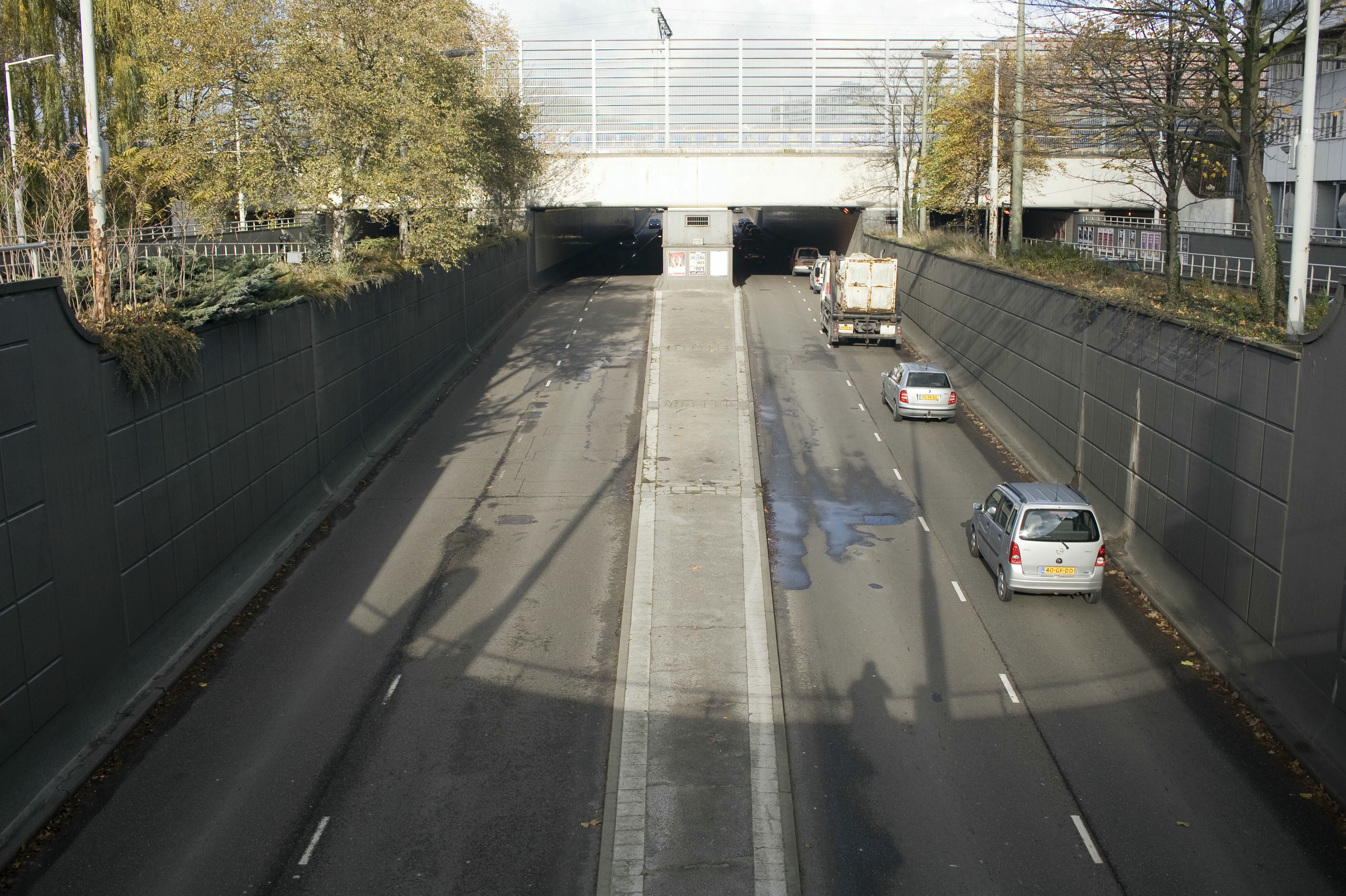 Maastunneltraverse - Statentunnel: Zicht op de Statentunnel, een spoortunnel